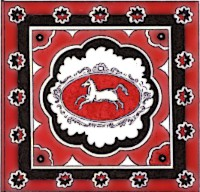 Bandiera della magistratura di San Martino del Gioco del Ponte di Pisa